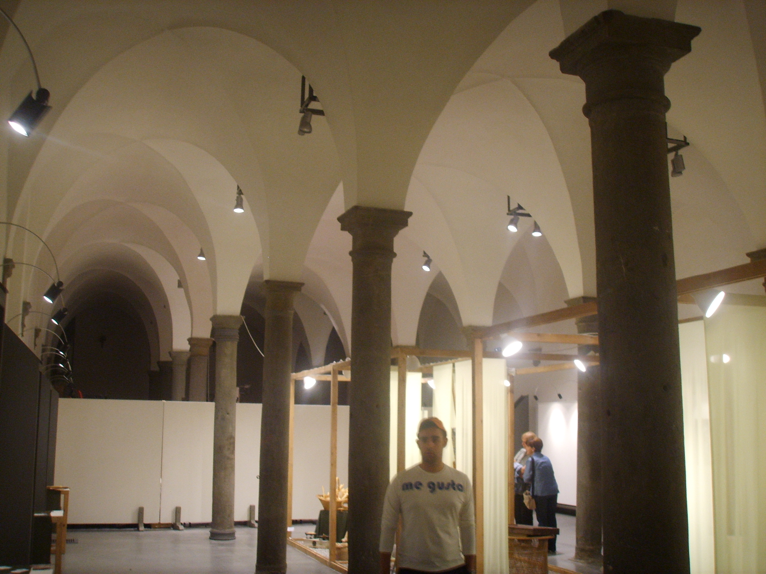 Scuderie mediecee poggio a caiano view